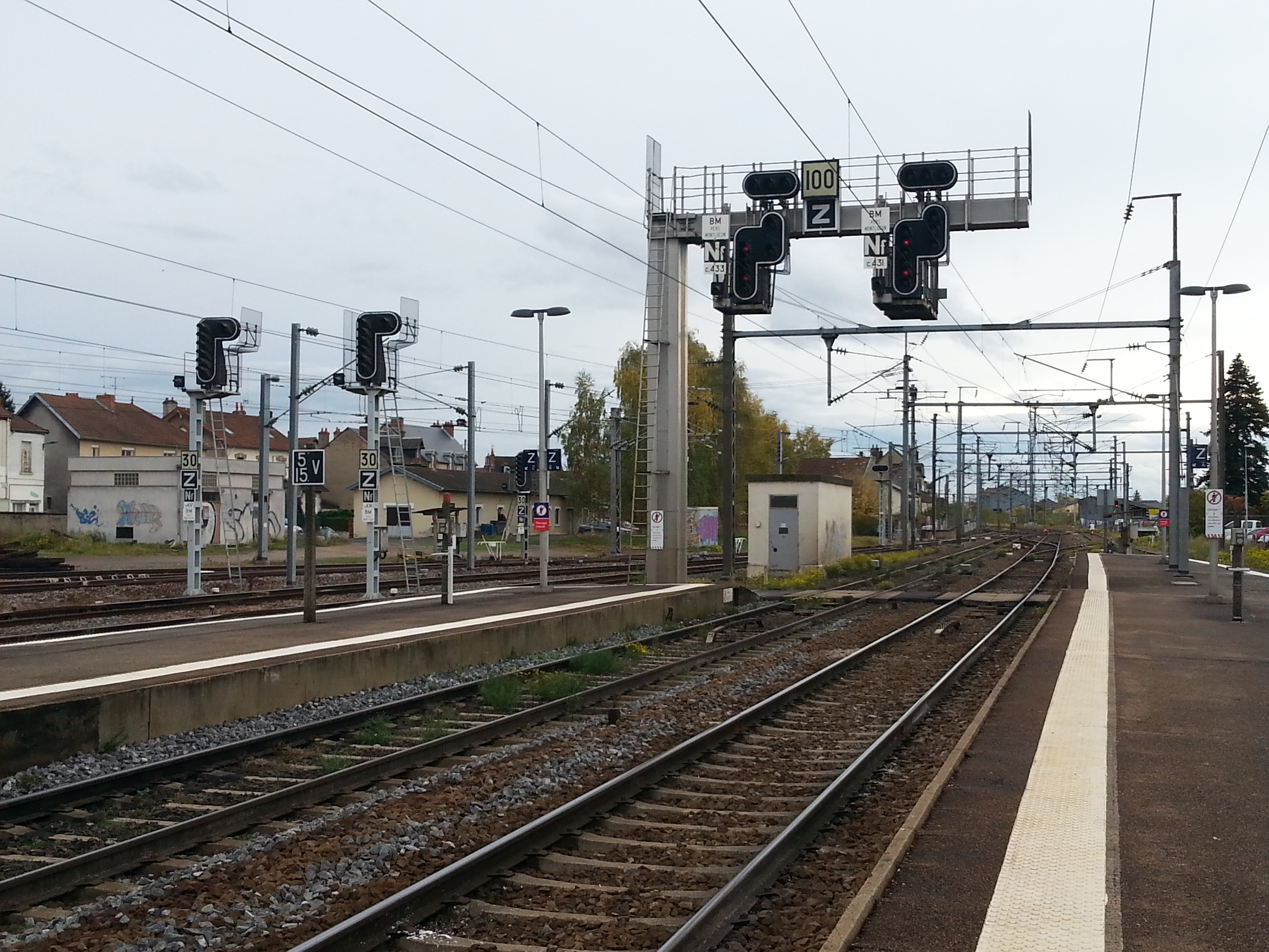 Signaux de sortie de la gare de Moulins-sur-Allier.